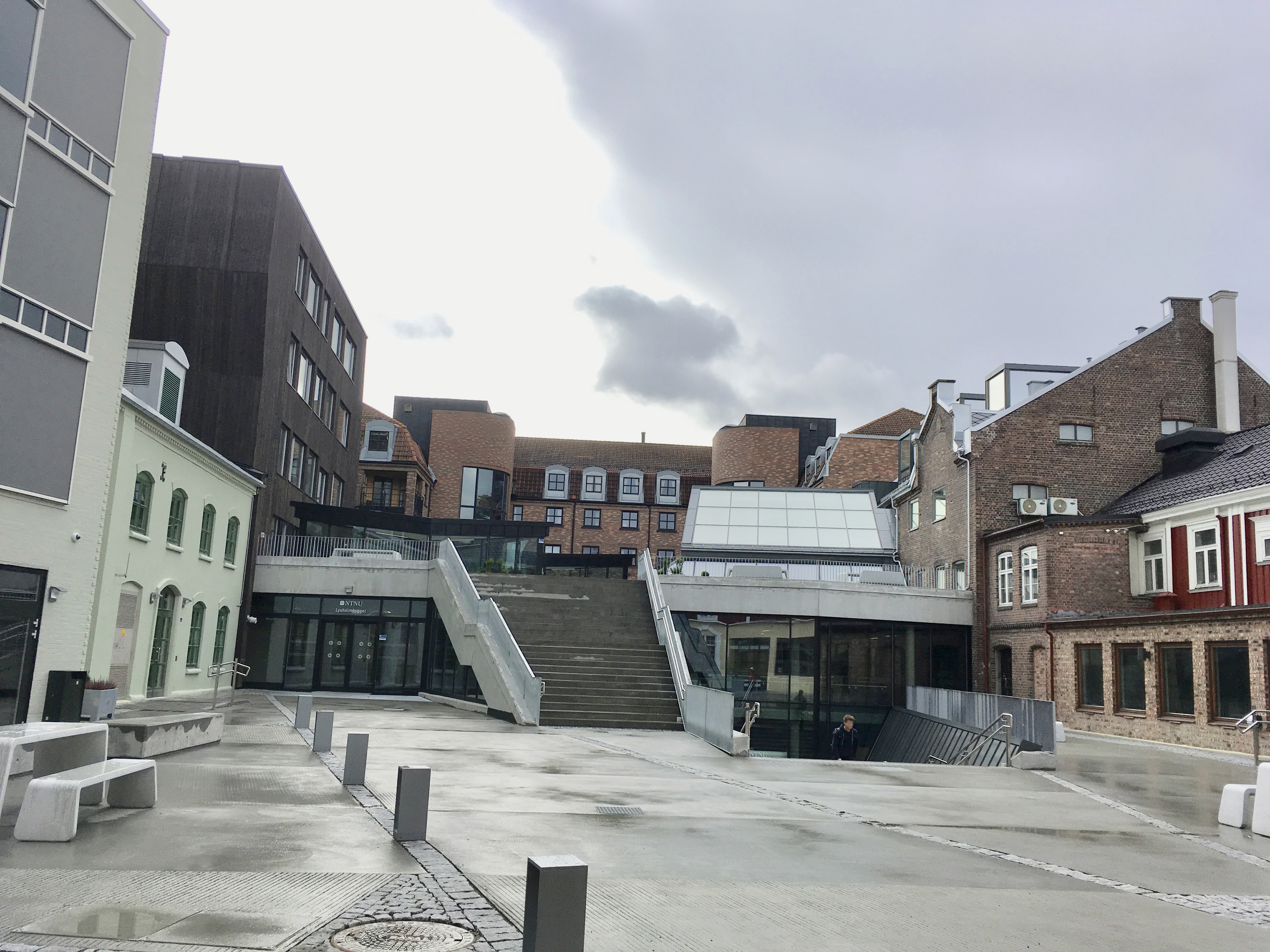 Lysholmbygget, Bergersen Arkitekter. Møte mellom gammelt og nytt. Trondheim kommunes byggeskikkpris 2018